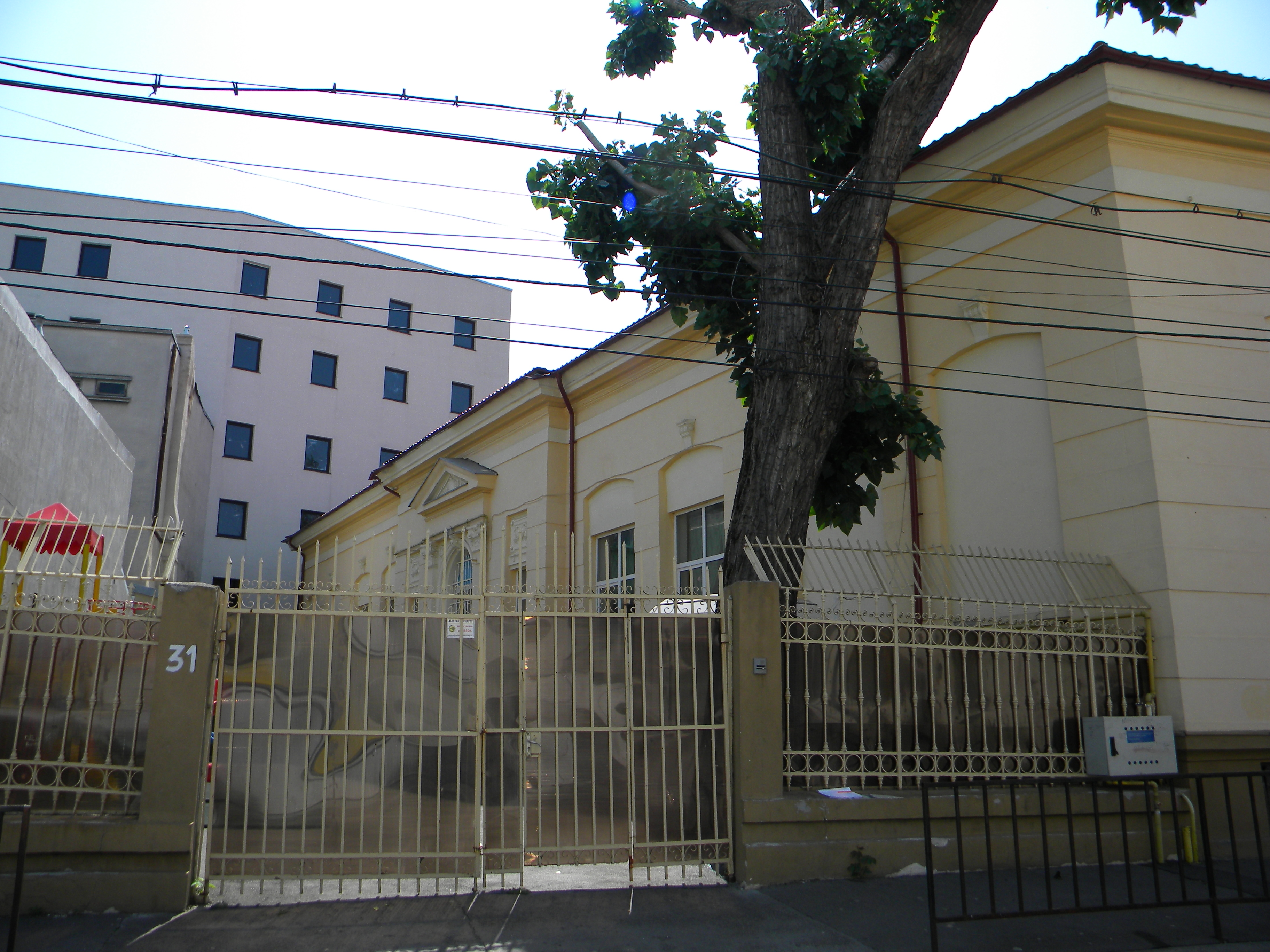 Bucuresti, Romania, Casa pe Str. Parfumului nr. 31; B-II-m-B-19341 (detaliu 1)